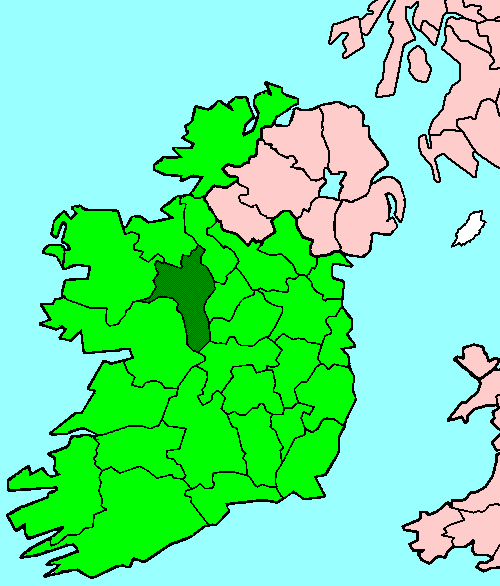 Roscommon